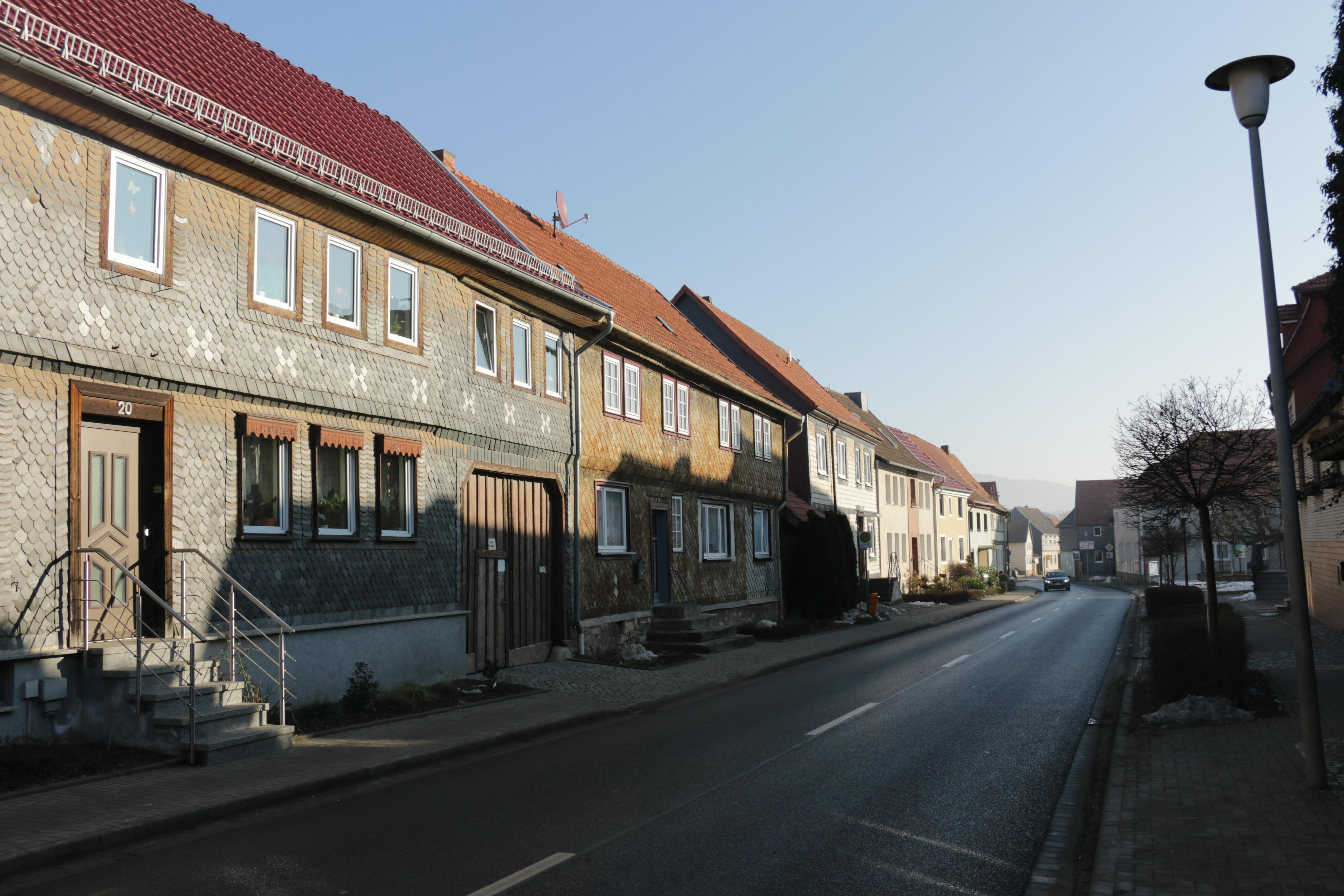 Haynrode, Hauptstraße.